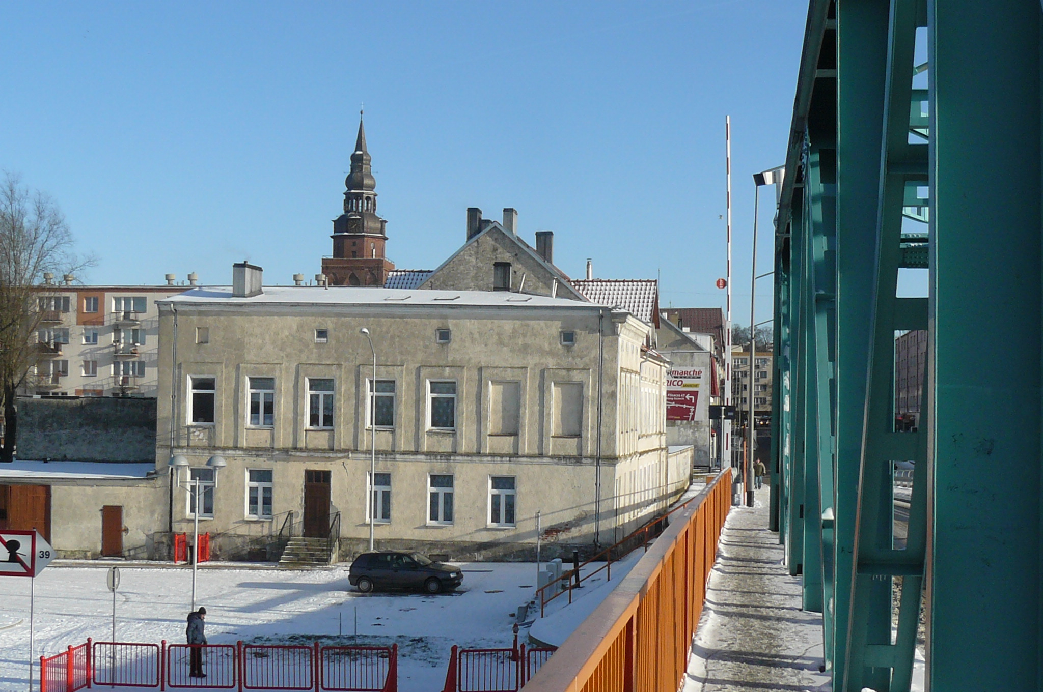 Most na Odrze w Gryfinie.